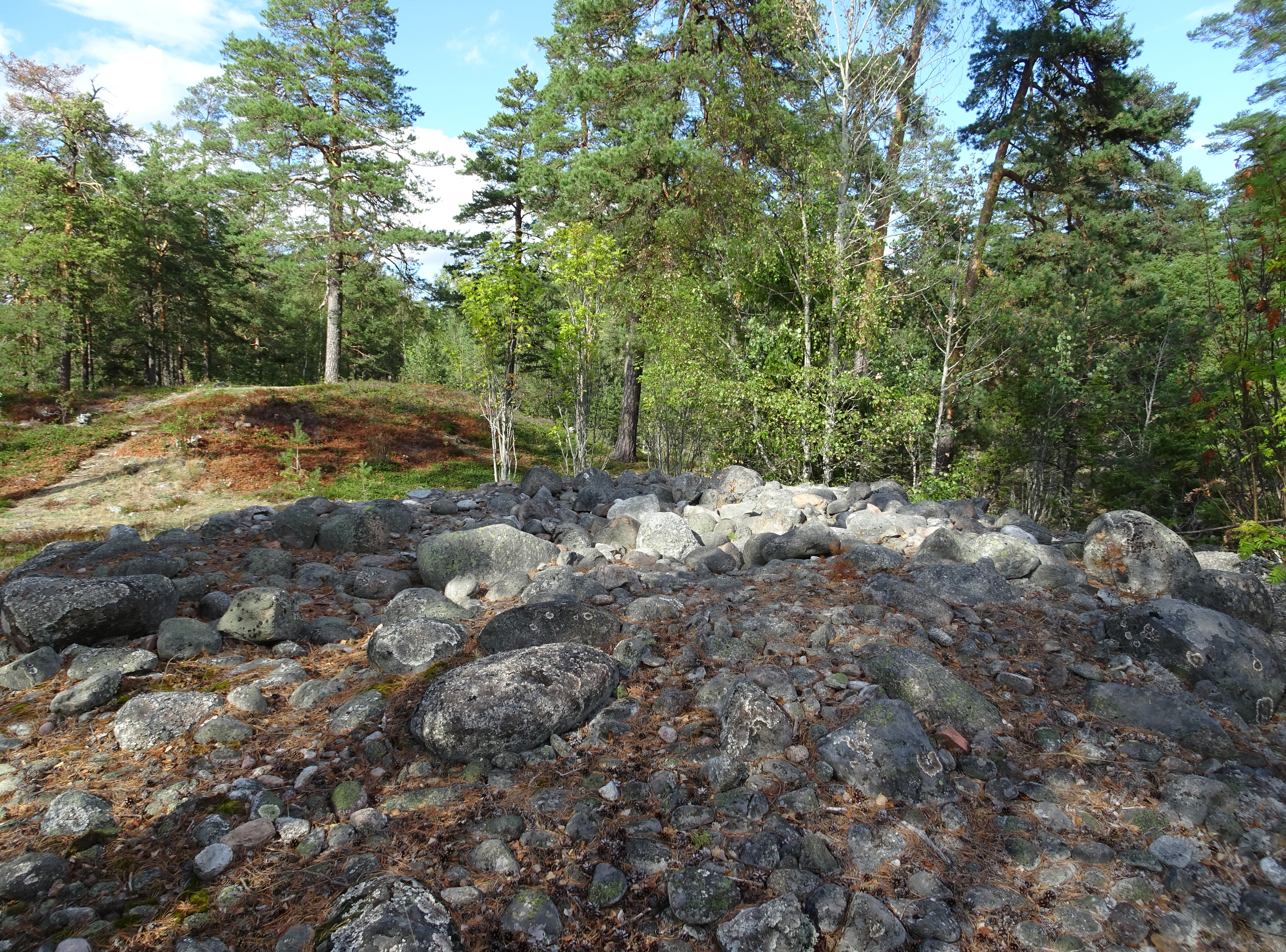 Rösaring, gravröse